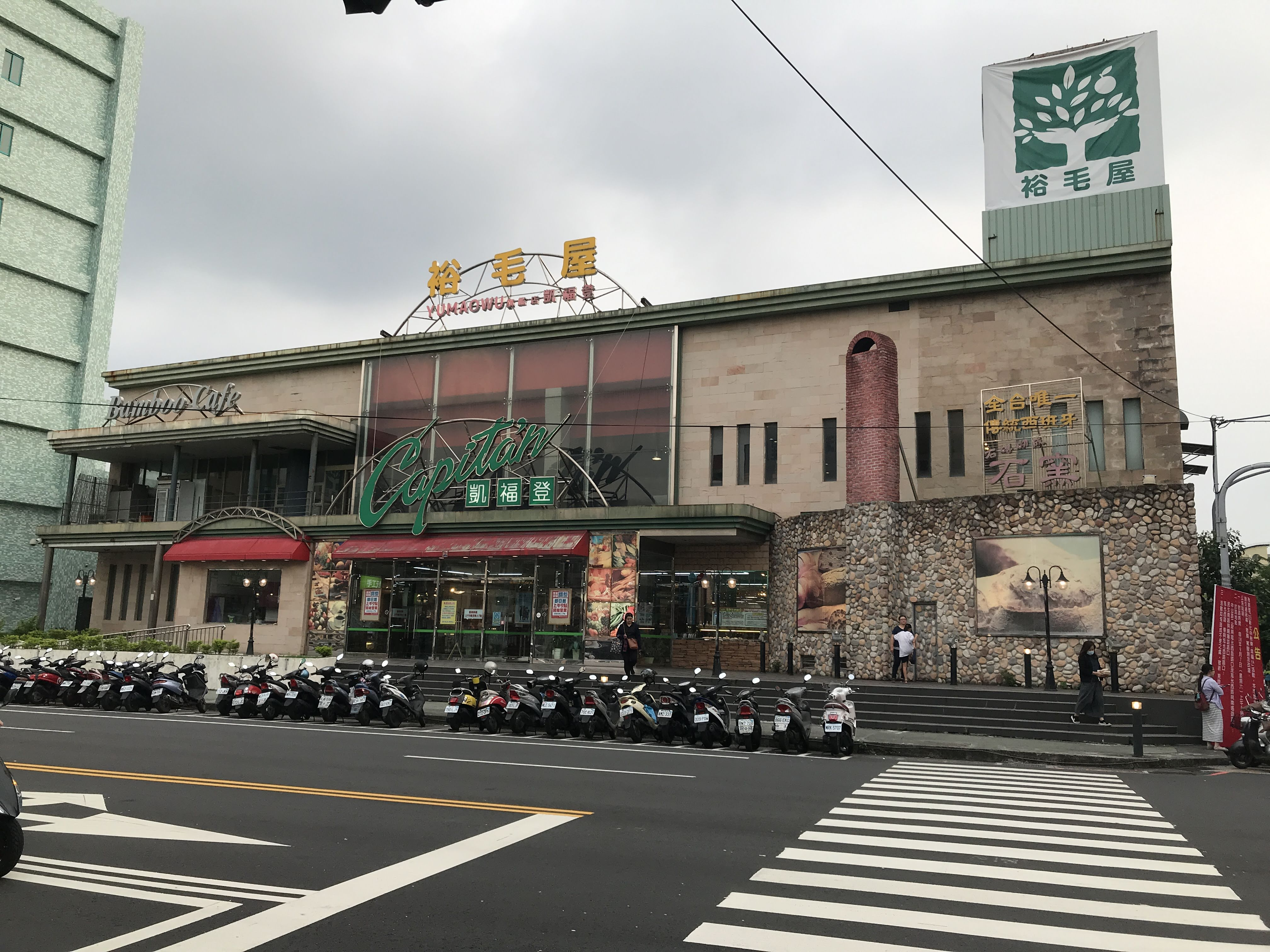 裕毛屋凱福登曉陽店